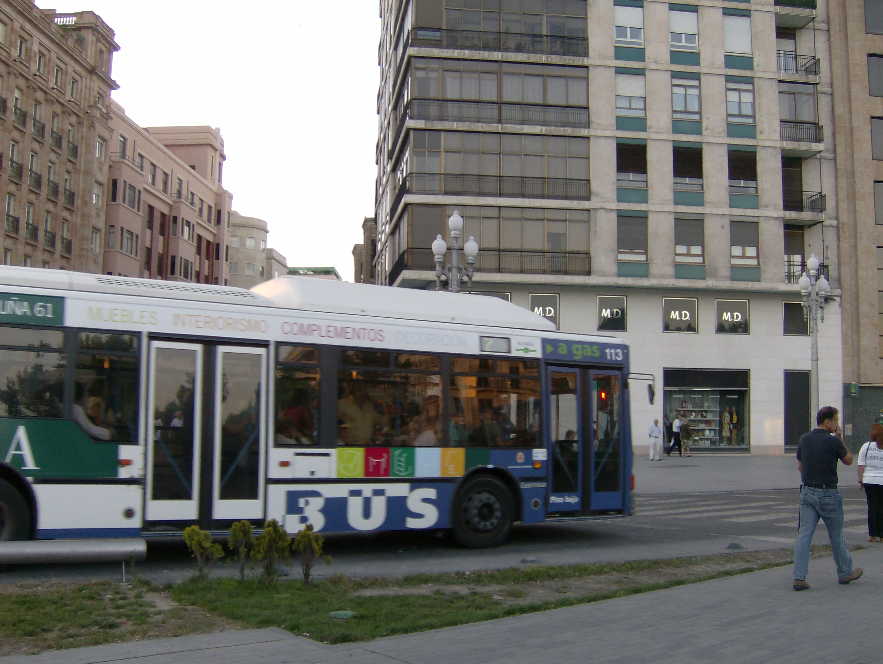 Autobus Urbano de Valladolid. Castrosua CNG.